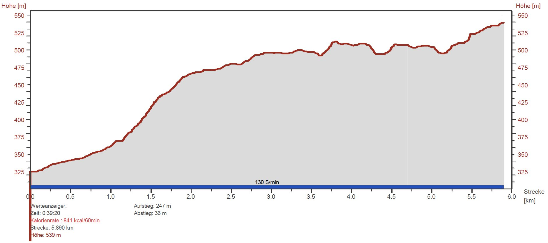 Streckenprofil des Kordigastberlaufs